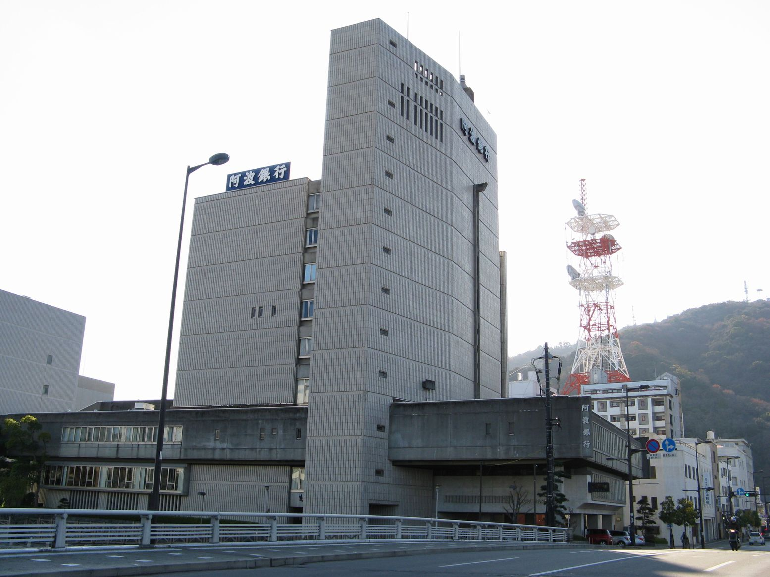 阿波銀行本店